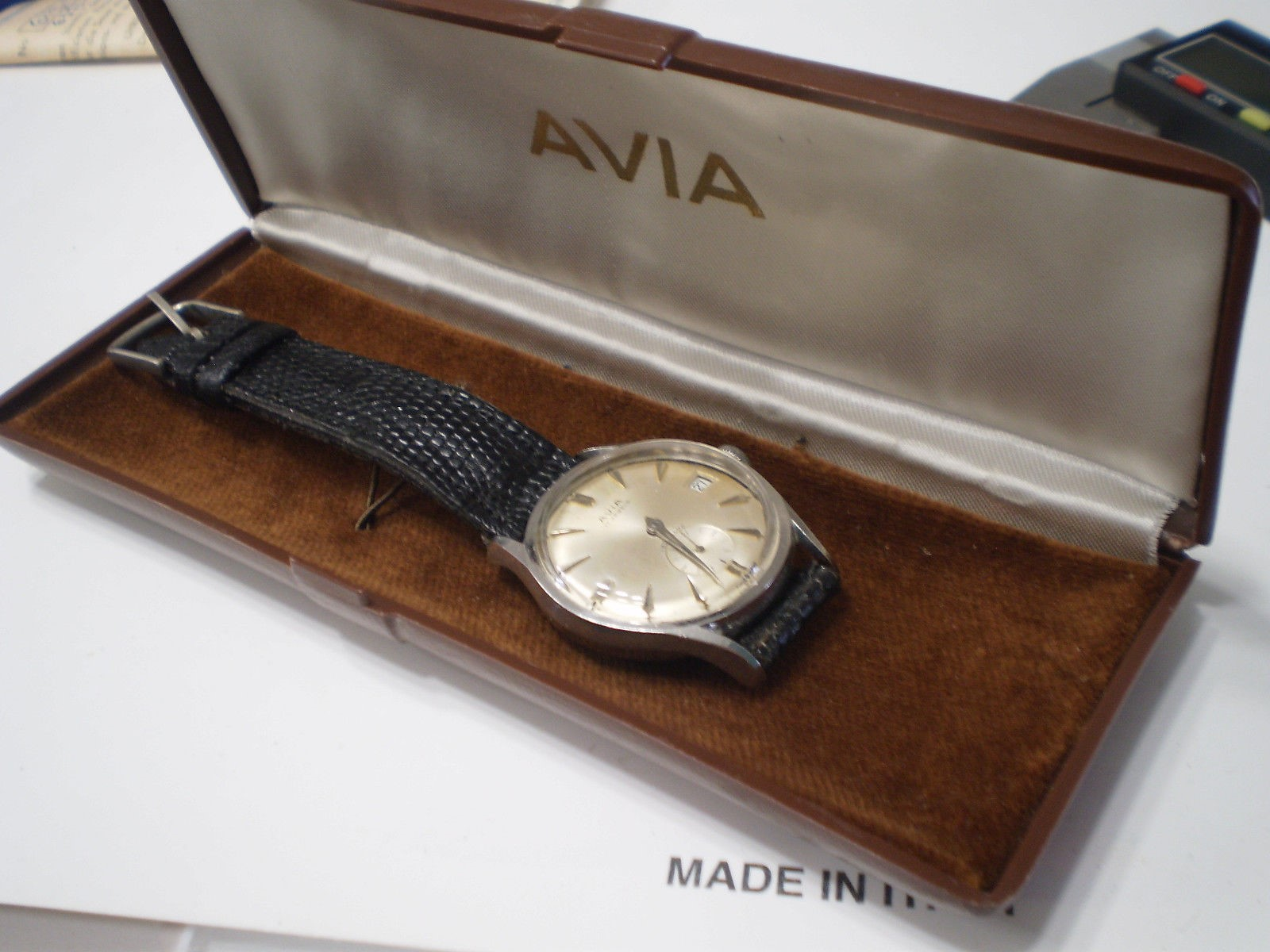 Un orologio Avia, a carica manuale degli anni '50, corredato di custodia originale